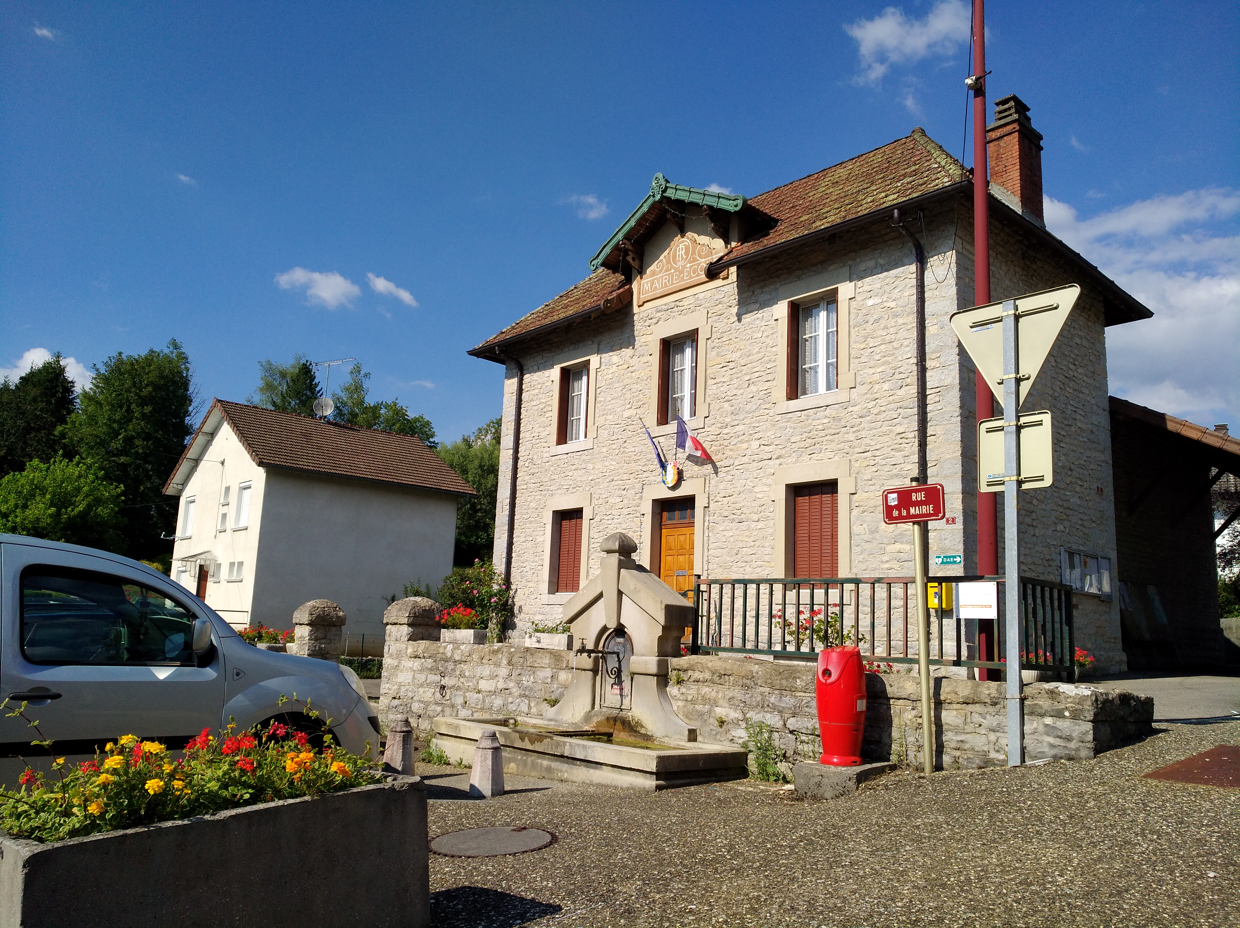 Mairie-école de Patornay (Jura, France) en juillet 2018.